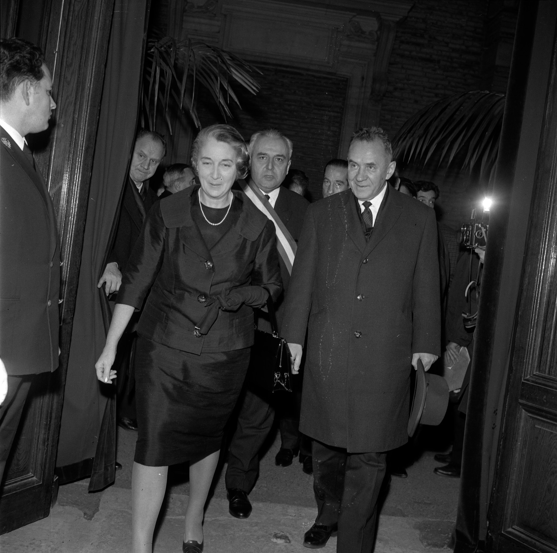 Pas de lieu. Le 5 Novembre 1966. Vue d'Alexis Kossyguine, président du conseil des ministres de l'Union des républiques socialistes soviétiques (URSS) avec sa femme à Toulouse.